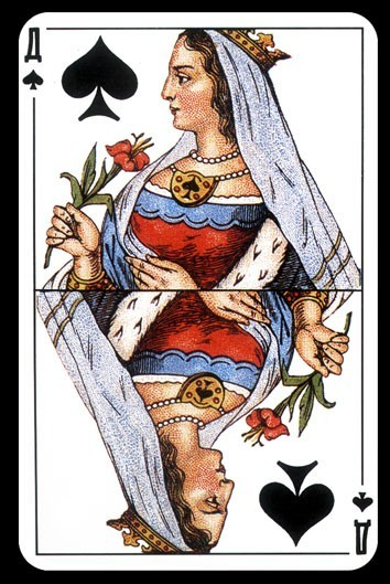 Атласная колода экстра дама пики